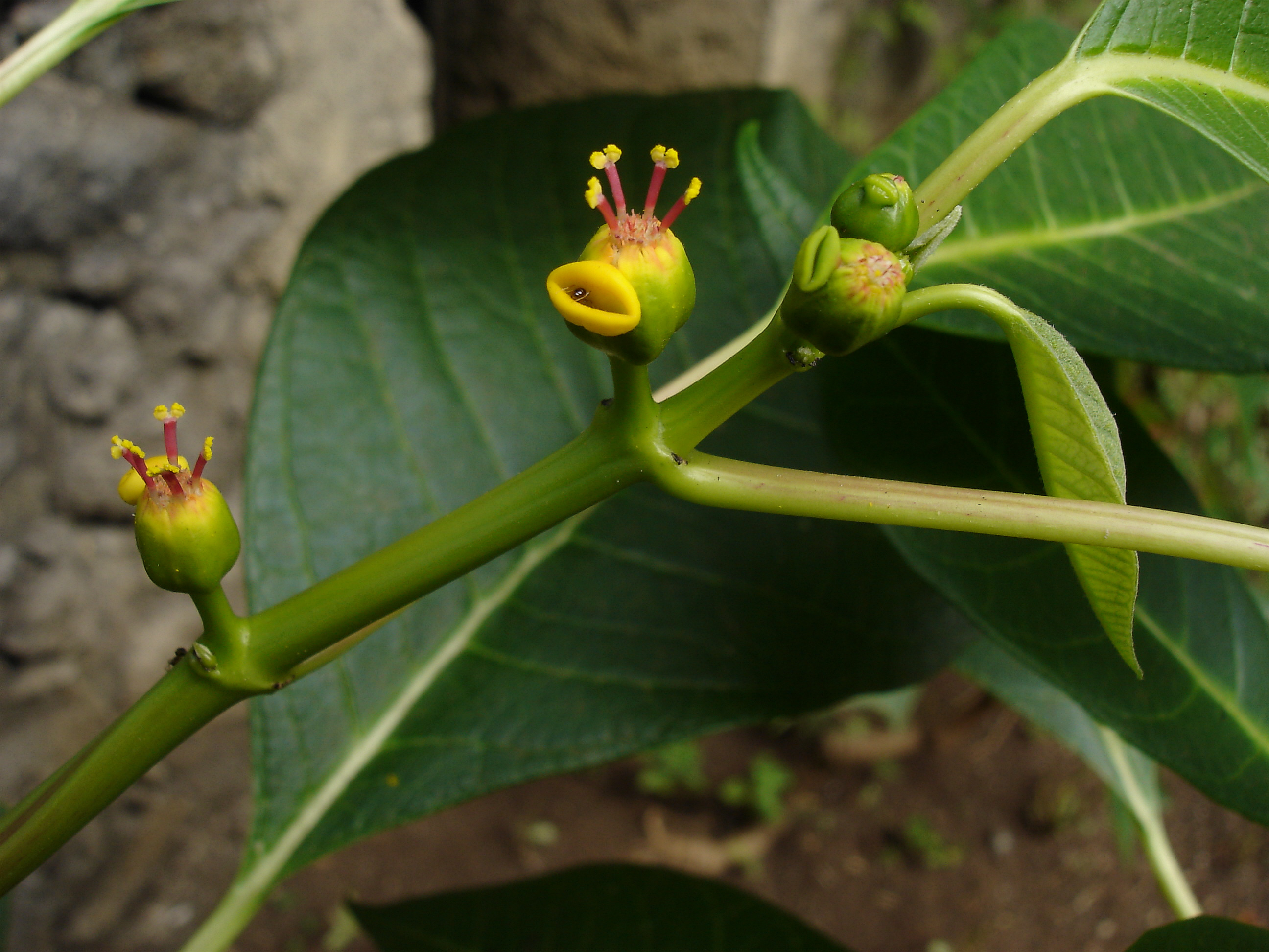 Description: Euphorbe du Conservatoire botanique de Mascarin, novembre 2004, La Réunion Source: Bouba